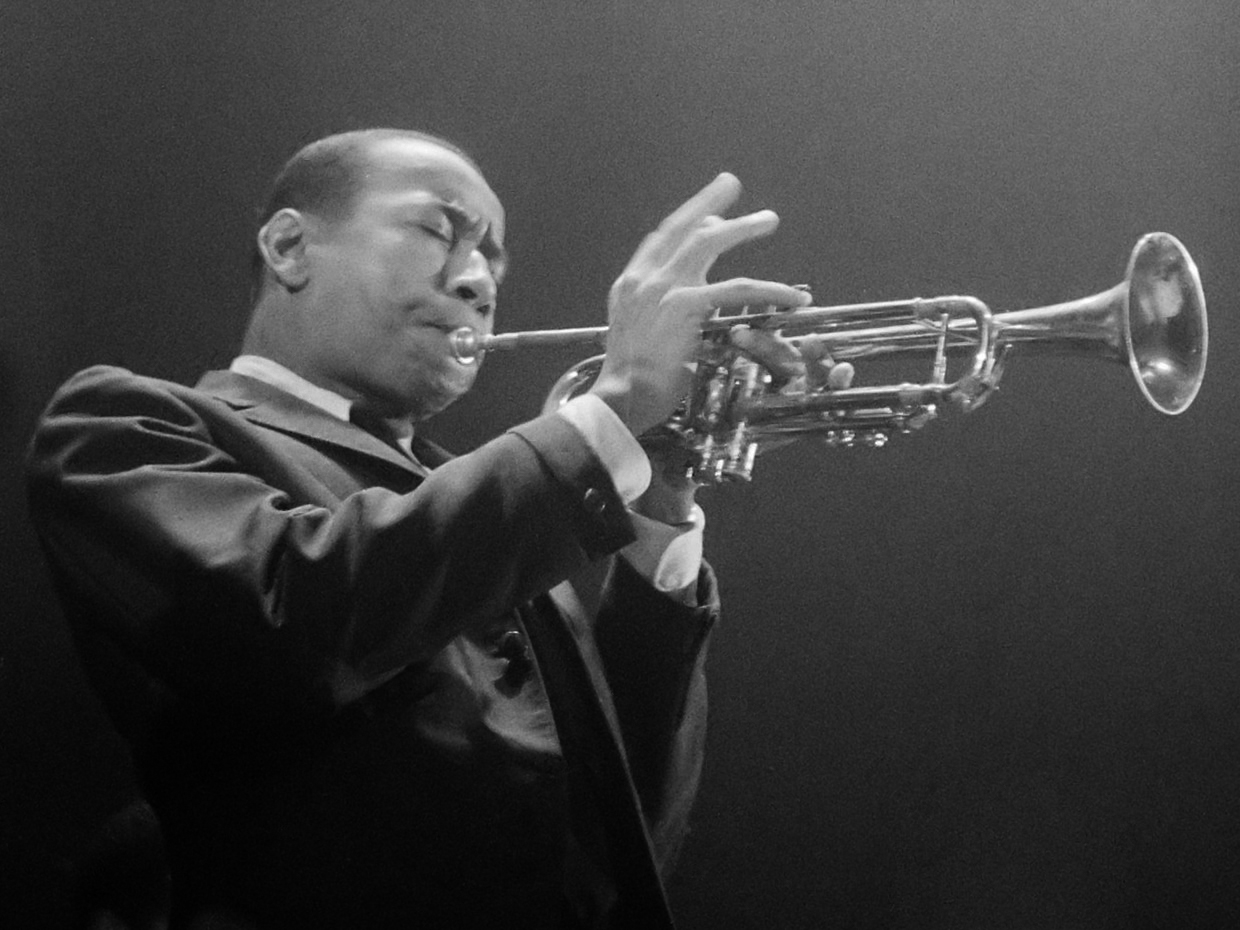 Concertgebouw Amsterdam, Art Blakey's Jazz Messengers Walter Davis Jr , Lee Morgan 15 november 1959